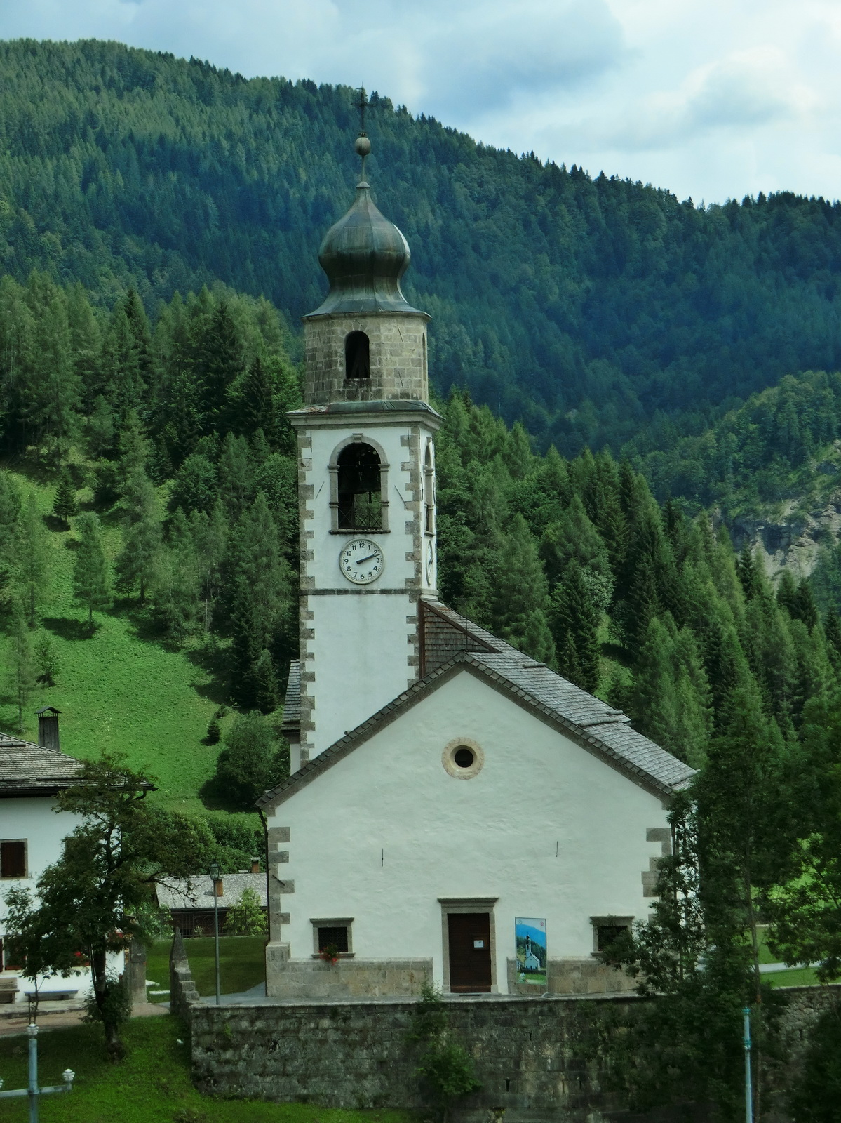 Church of Saint Oswald Native nameChiesa di Sant'OsvaldoLocationSauris di Sotto, Friuli-Venezia Giulia, ItalyCoordinates46° 27′ 57.71″ N, 12° 42′ 28.4″ E